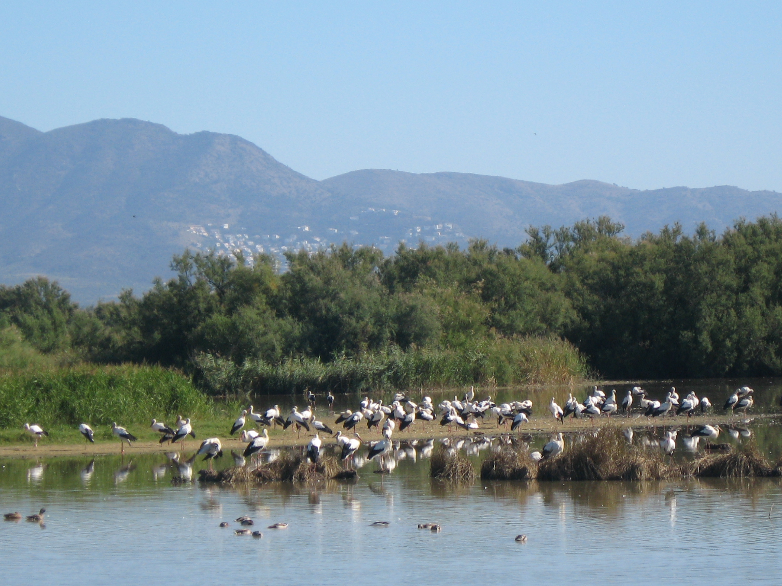 Störche im Naturpark Aiguamolls de l’Empordà (Spanien/Katalonien)